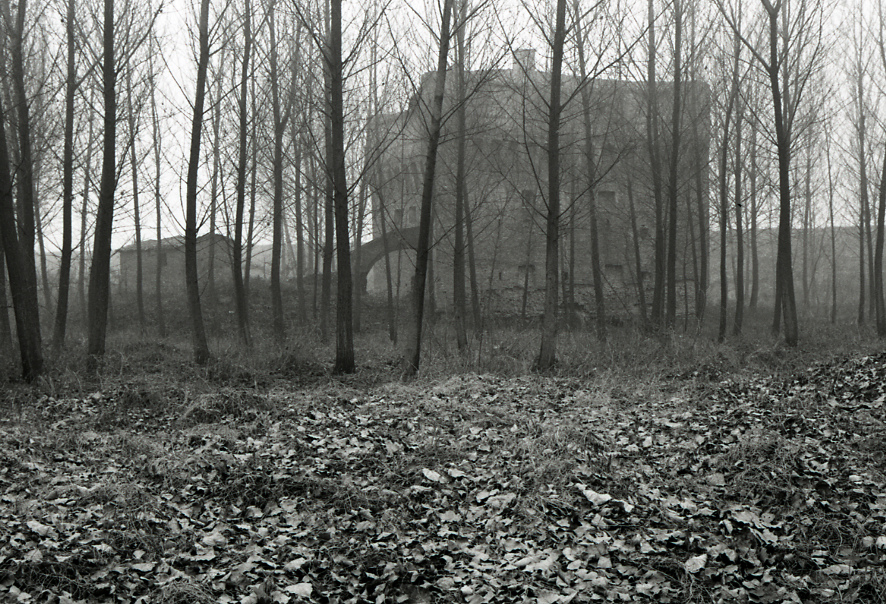 Bondeno. Stellata di Bondeno: la Rocca di Stellata immersa nei boschi. Servizio fotografico : Bondeno, 1975 / Paolo Monti. - Strisce: 4, Fotogrammi complessivi: 20 : Negativo b/n, gelatina bromuro d'argento/ pellicola ; 35 mm. - ((Sul portanegativi: N[I]K[MA]T FP4. - All'interno del portanegativi: la serie è anche identificata da una linea orizzontale a pennarello nero che separa la suddetta serie dalla precedente di soggetto diverso. - Occasione: Documentazione del territorio della provincia di Ferrara e dei centri storici minori. - Fonte: Agenda di Paolo Monti: Leica 1501-3000 Controllo numerazione (1950-1978), presso Archivio Paolo Monti. - Fonte: Fattura di Paolo Monti: IV. Commesse/ Fattura n. 11 (1975/04/29), presso Archivio Paolo Monti. - Fonte: Monografia: Territorio ferrarese: un programma di governo della Regione e delle autonomie locali, catalogo della mostra, Ferrara 1975, a cura di Roberto FREGNA, Modena, Soc. Immobiliare & Poligrafica emiliana (1975)